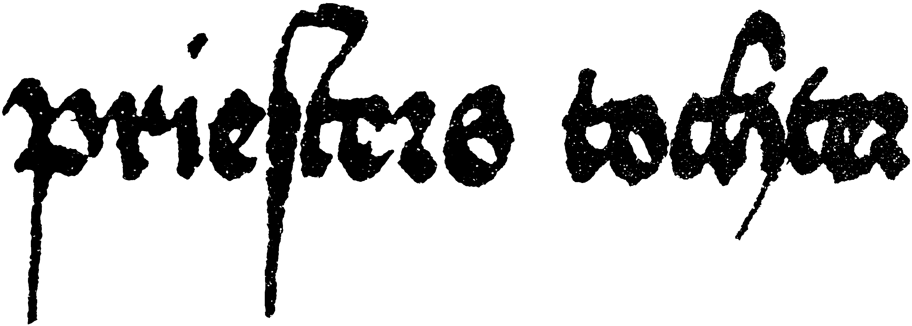 Schriftprobe der Schwäbischen Bastarda: Zwei per Bild-Nachbearbeitung freigestellte Wörter aus einem Scan einer Predigthandschrift von 1494 („Von einem pruder der begeret eines heydnischen pristers tochter“, St. Katharinenkloster zu Söfflingen bei Ulm, Ms. Germ. 2° 741 Bl. 338v). – Zugrundeliegende Abbildung und Quelle der bibliografischen Angabe: Ernst Crous / Joachim Kirchner, Die gotischen Schriftarten, Leipzig 1928, S. 42 / Tafel 21 Abb. 35. – Das Beispiel zeigt den Kontrast zwischen langem und runden s, sowie zwischen geradem und runden r.